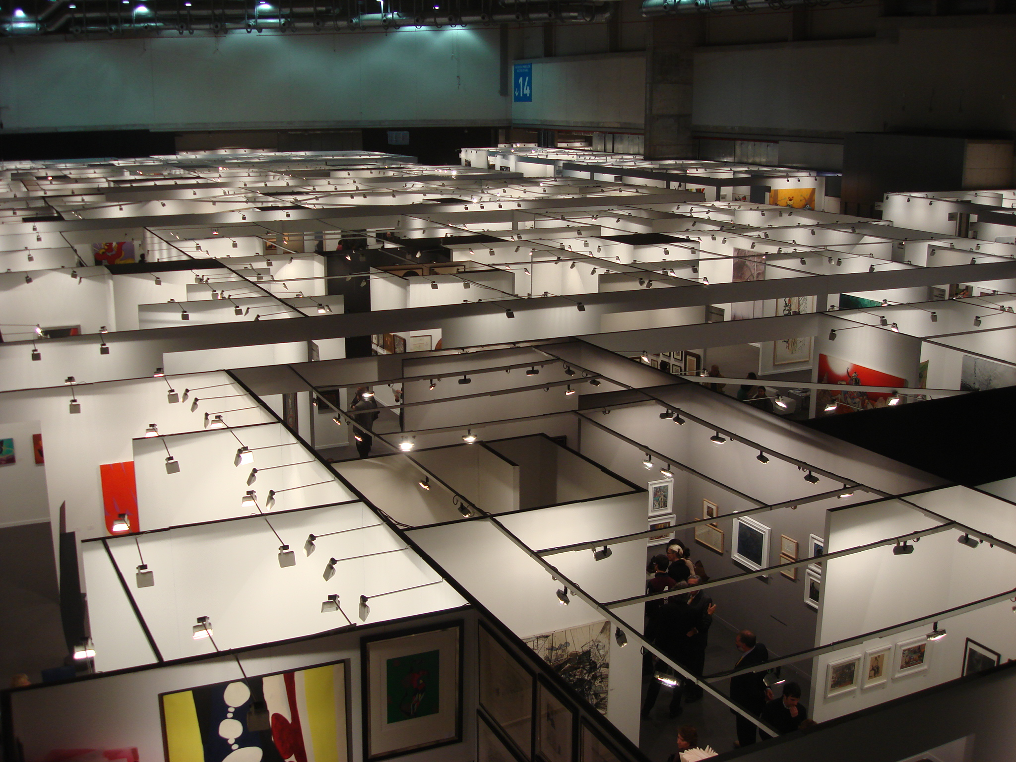 (ARCO8 - Madrid)